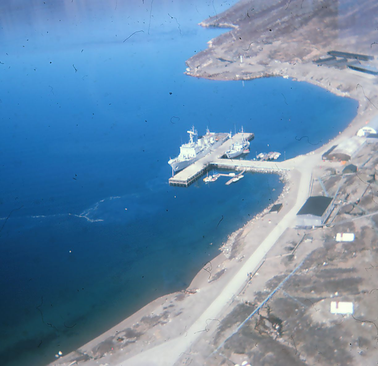 F340 Inspektionsskibet Beskytteren i havn ved Marinestation Grønnedal, april 1977.